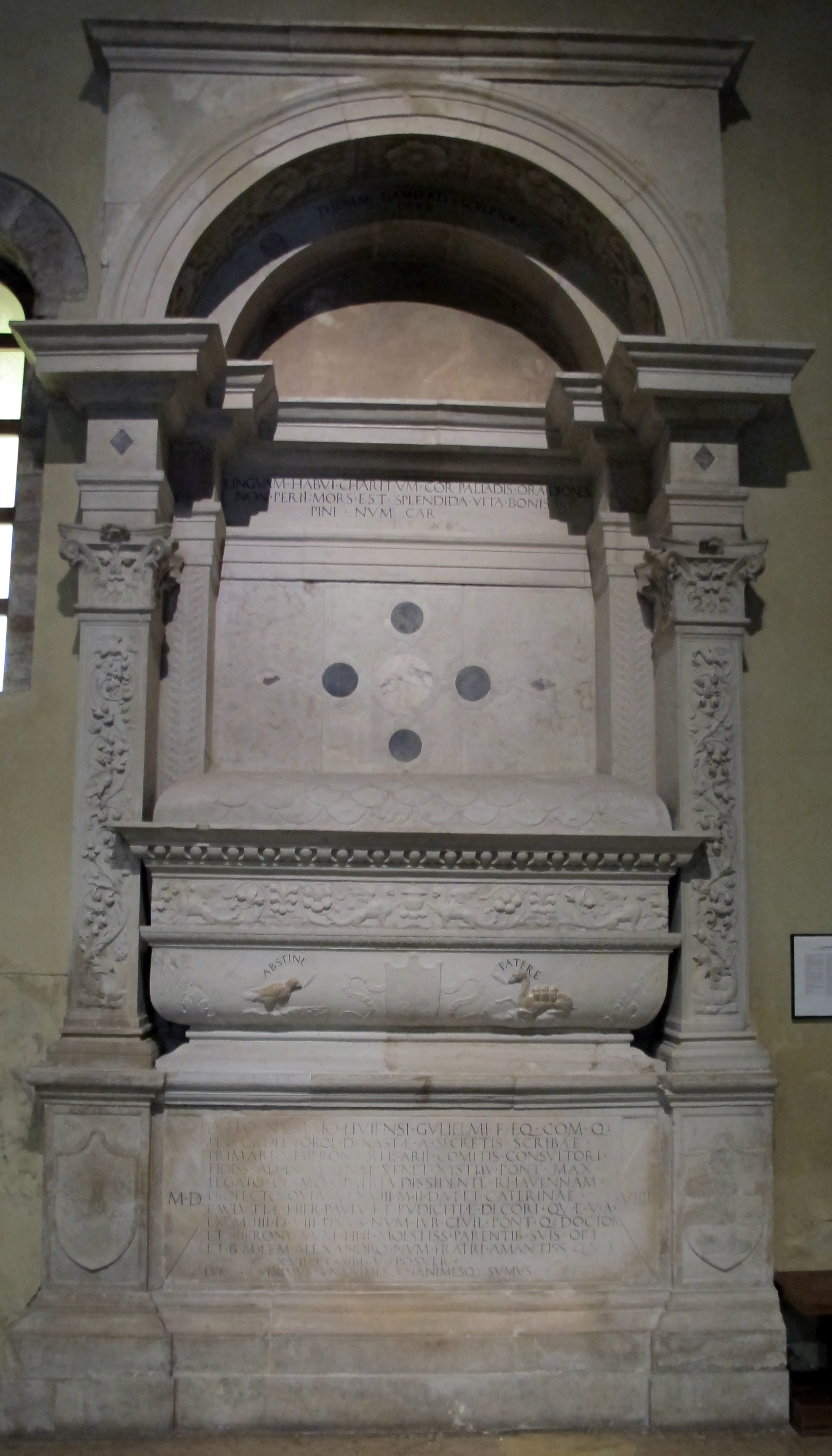 Ravenna, s. francesco, int., tommaso flamberti, monumento di luffo numai, 1509